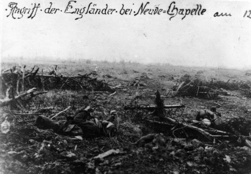 Angriff der Engländer bei Neuve-Chapelle am 12....